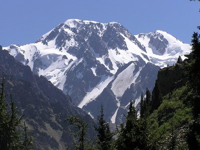 Talgar Peak, Talgar, Tian Shan